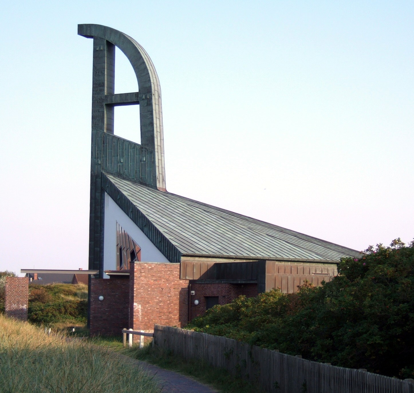 Katholische Kirche der Nordseeinsel Langeoog